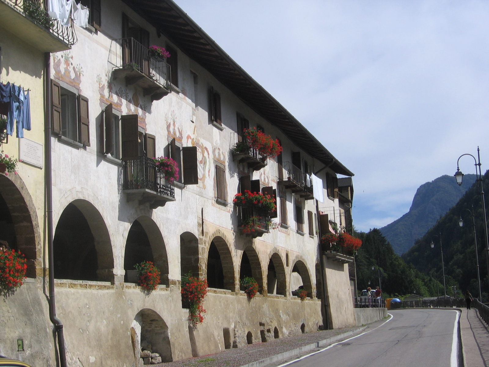 Averara, Bergamo, Italy